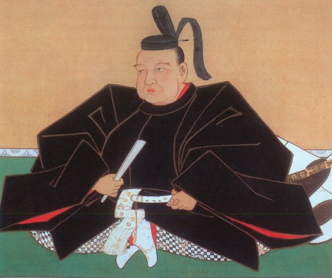 伊達政宗。Date Masamune.安土桃山時代から江戸時代初期にかけての大名。この肖像画は隻眼であった伊達政宗の「肖像画を描くときは両目のあるものにしてほしい」との遺言に従い両目が描かれている。